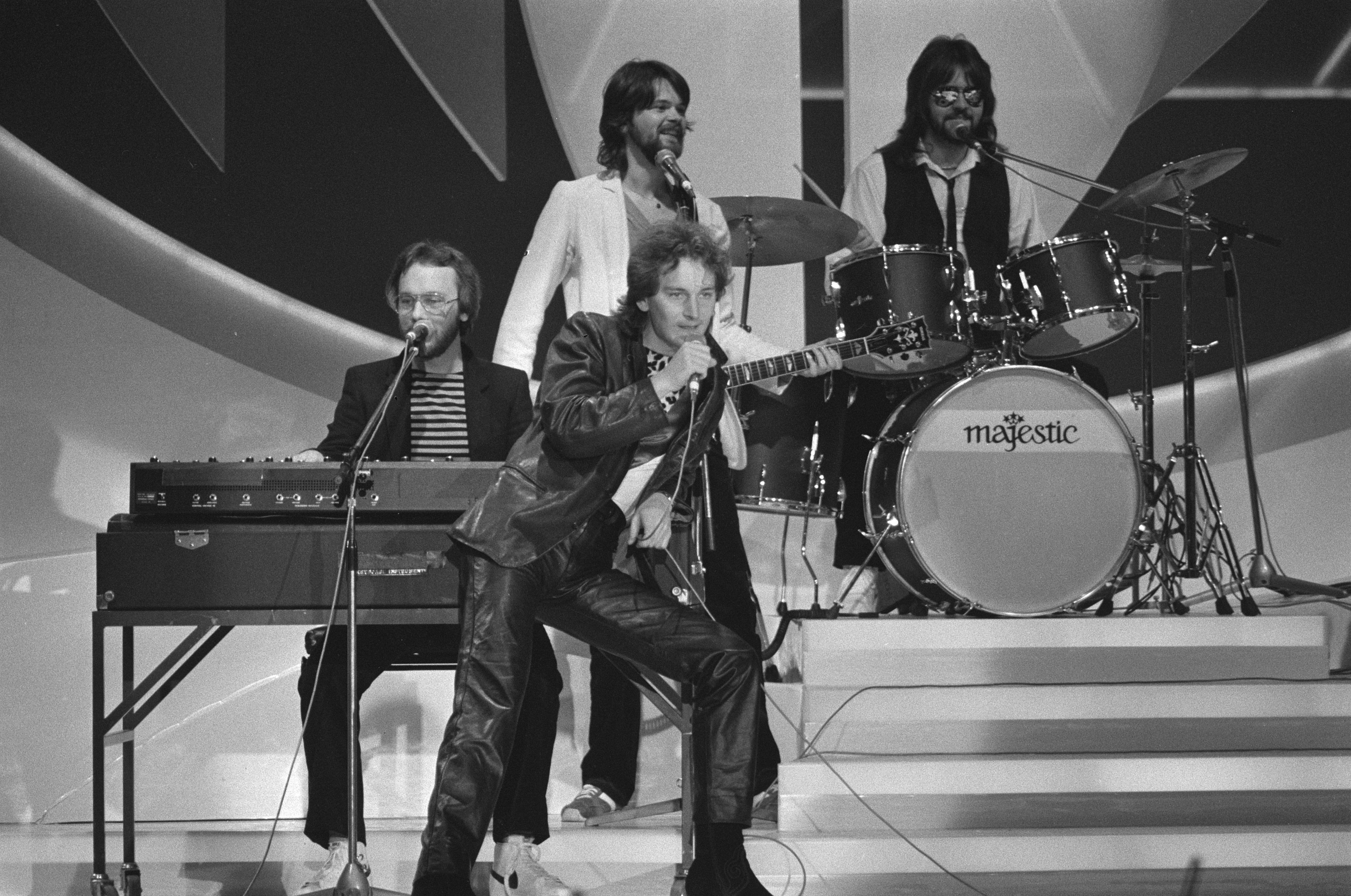 Collectie / Archief : Fotocollectie Anefo Reportage / Serie : [ onbekend ] Beschrijving : Deelnemers Eurovisie Song Festival in Den Haag ; nr. 14 , 15: Tomas Ledin (Zweden), nr. 16 , 17: Paola (Zwitserland) Datum : 22 april 1980 Locatie : Den Haag, Zweden, Zwitserland Trefwoorden : deelnemers, songfestivals Instellingsnaam : Eurovisie Song Festival Fotograaf : Dijk, Hans van / Anefo Auteursrechthebbende : Nationaal Archief Materiaalsoort : Negatief (zwart/wit) Nummer archiefinventaris : bekijk toegang 2.24.01.05 Bestanddeelnummer : 930-7868